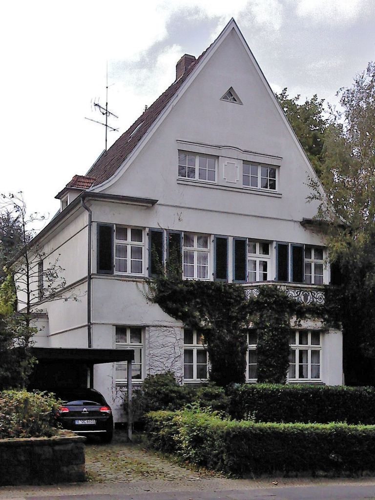 Schinkelstraße 34 im Essener Südostviertel, Wohngebäude unter Denkmalschutz; hier lebte Bundespräsident Gustav Heinemann vom 1. Januar 1936 bis zu seinem Tode.